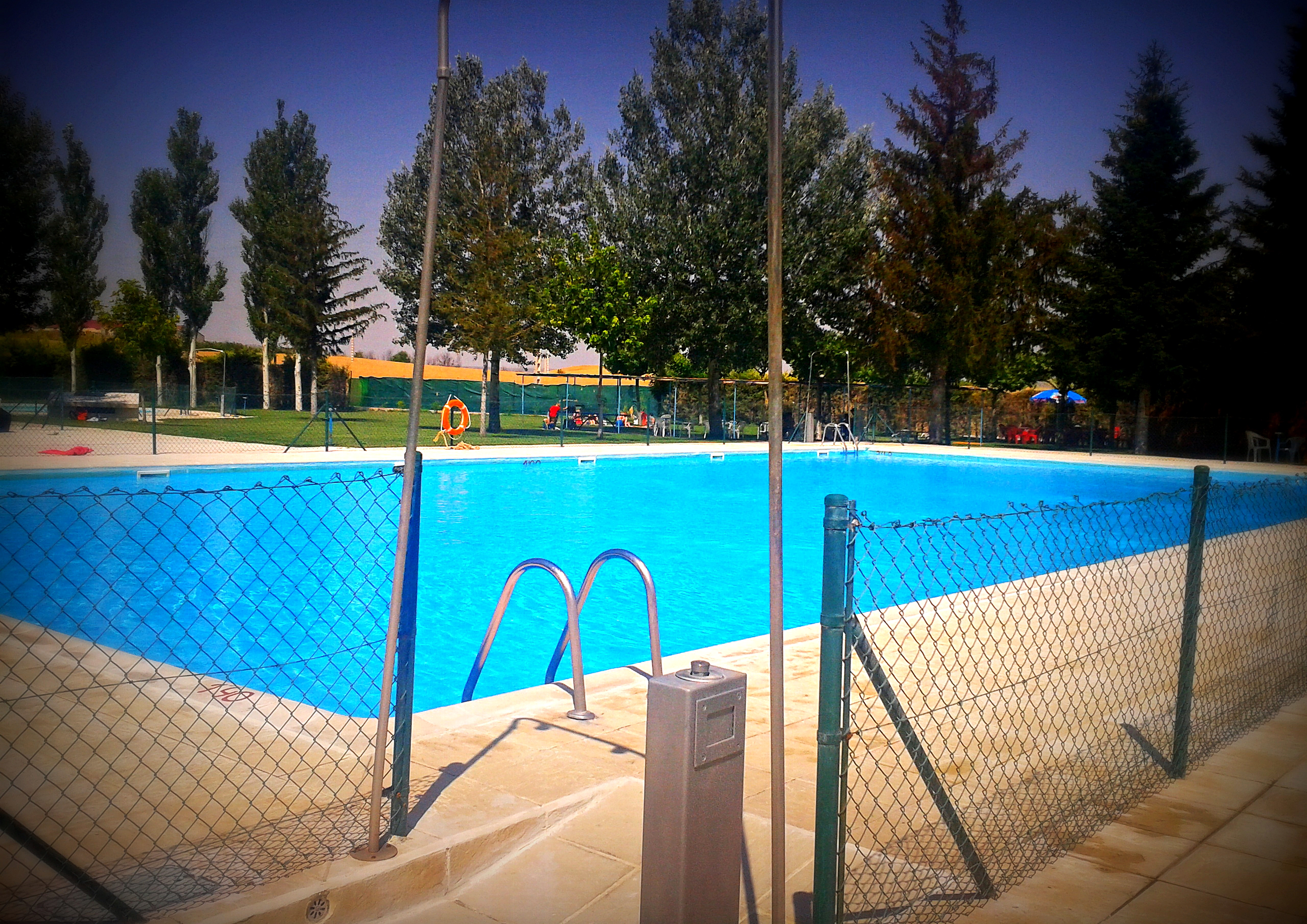 Piscinas de Baltanás